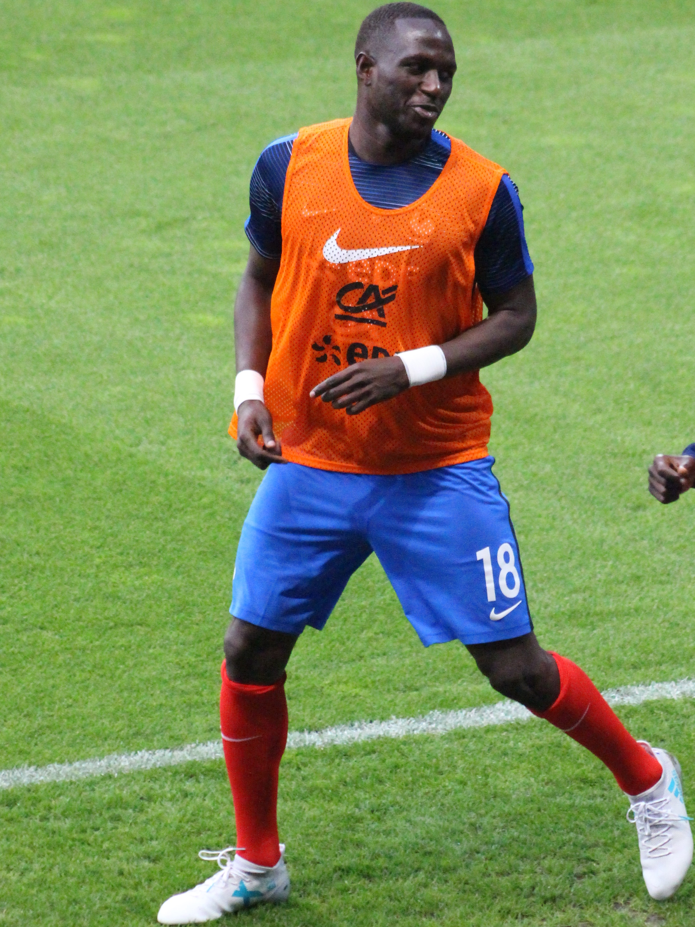 Moussa Sissoko à l'échauffement avant son entrée en jeu contre le Paraguay (match amical, 2 juin 2017) au Roazhon Park